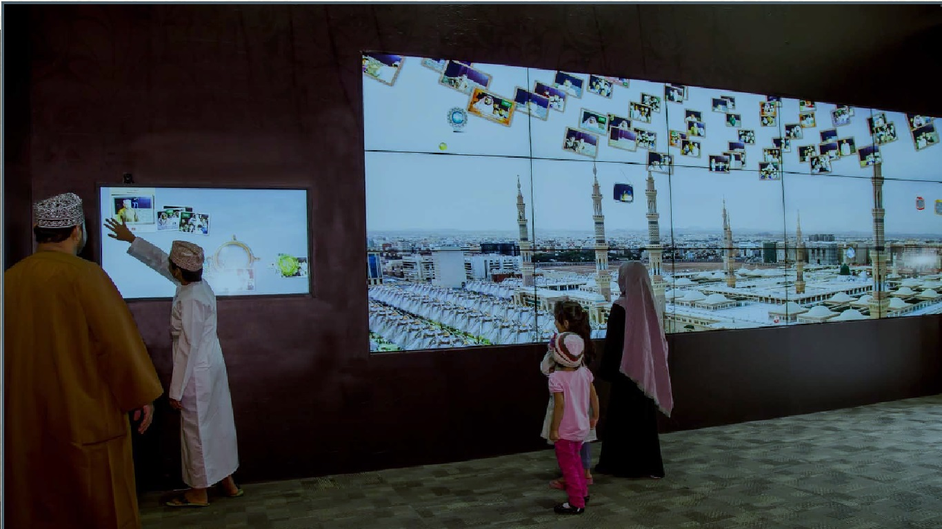 قاعة القاعة التذكارية في معرض أسماء الله الحسنى بالمدينة المنورة